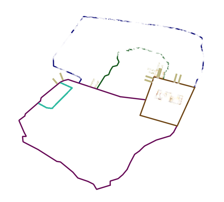 ירושלים 70 - הסוללות במערב